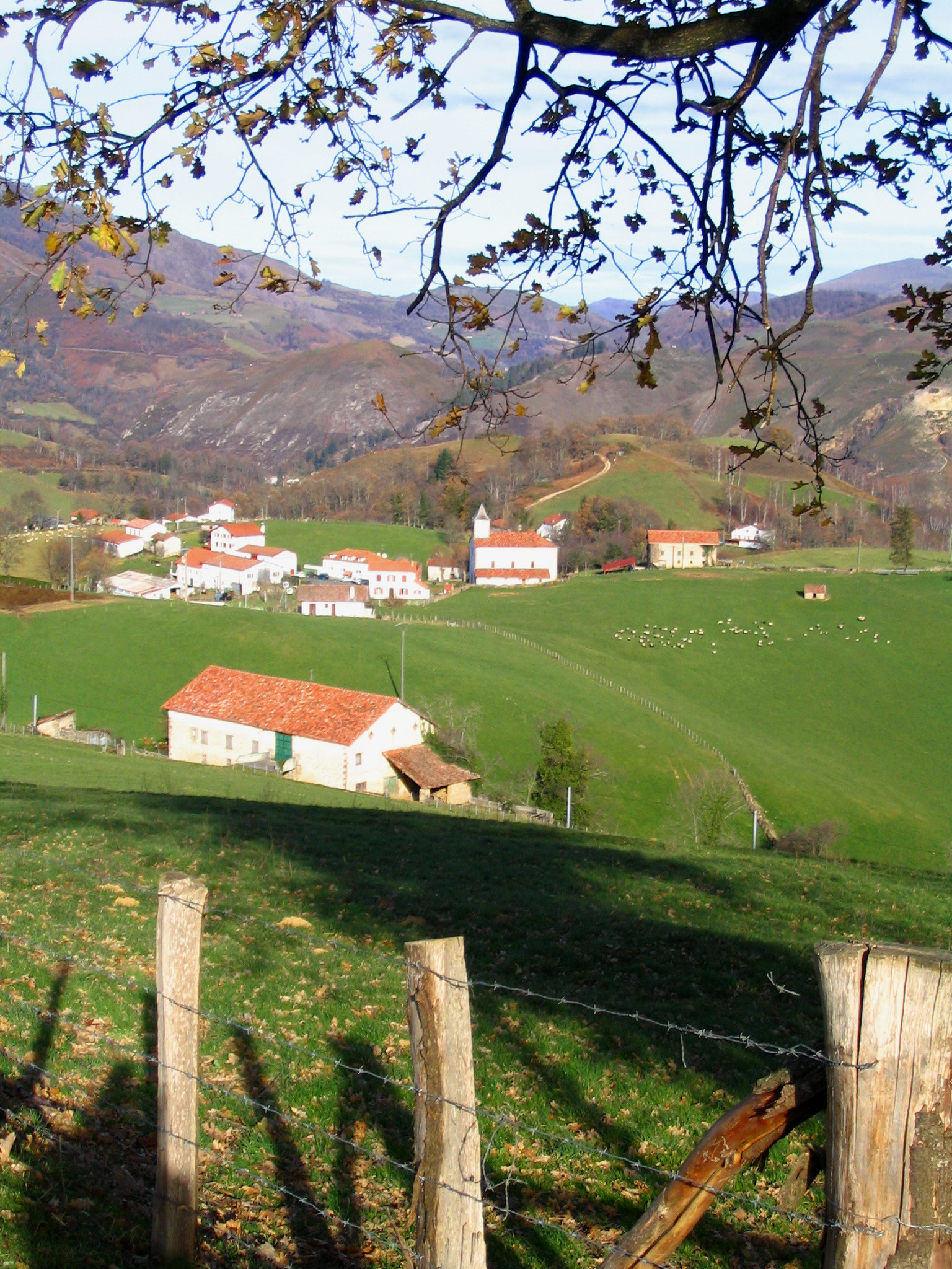 Village d'Esnazu - Pays Basque - Pyrénées Atlantiques - France Auteur/author: P.Charpiat 2006